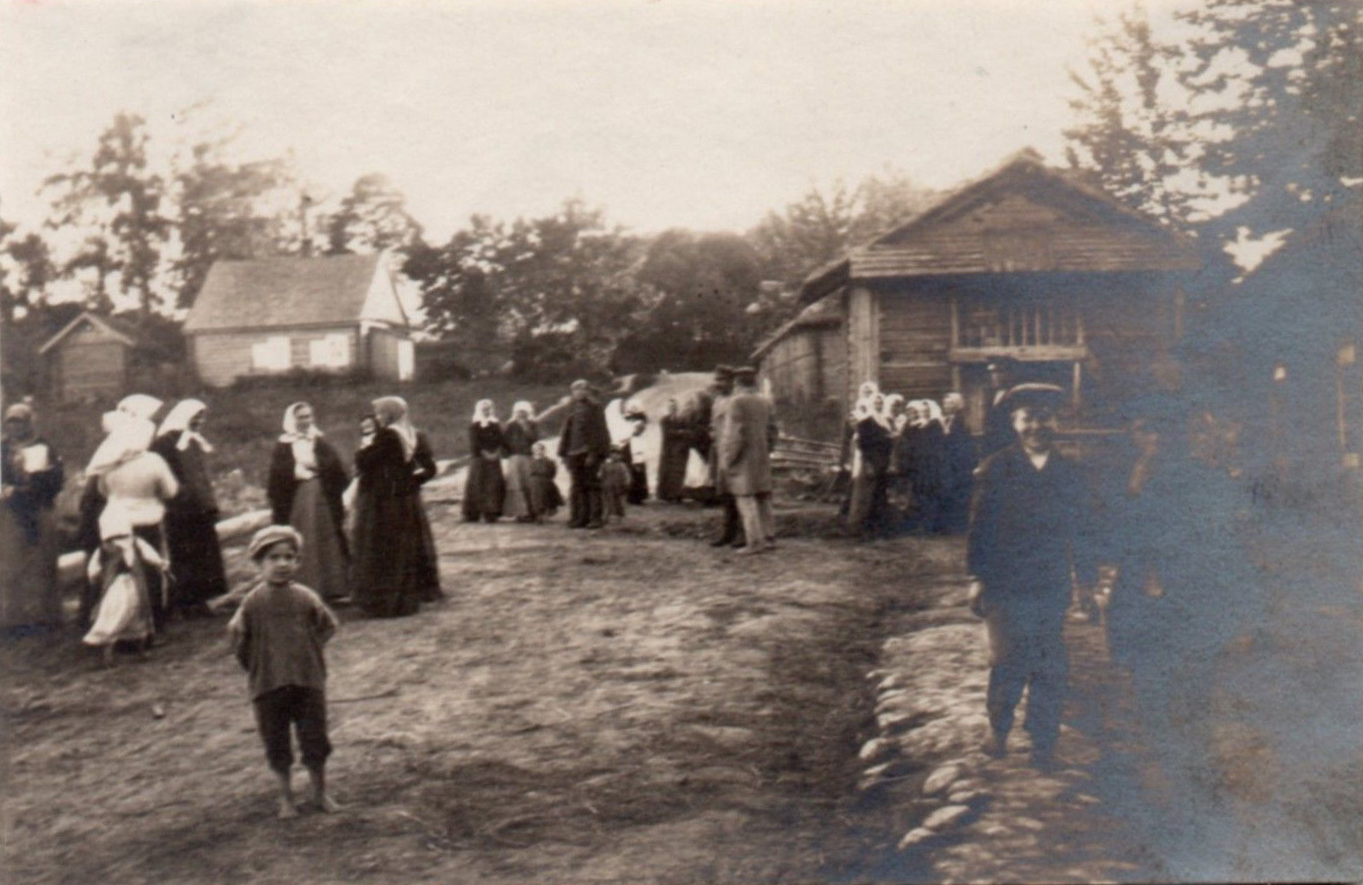 Беларуская (тарашкевіца): Жукойні Жалядзкія (Žukojni Žaladzkija). Касьцёл